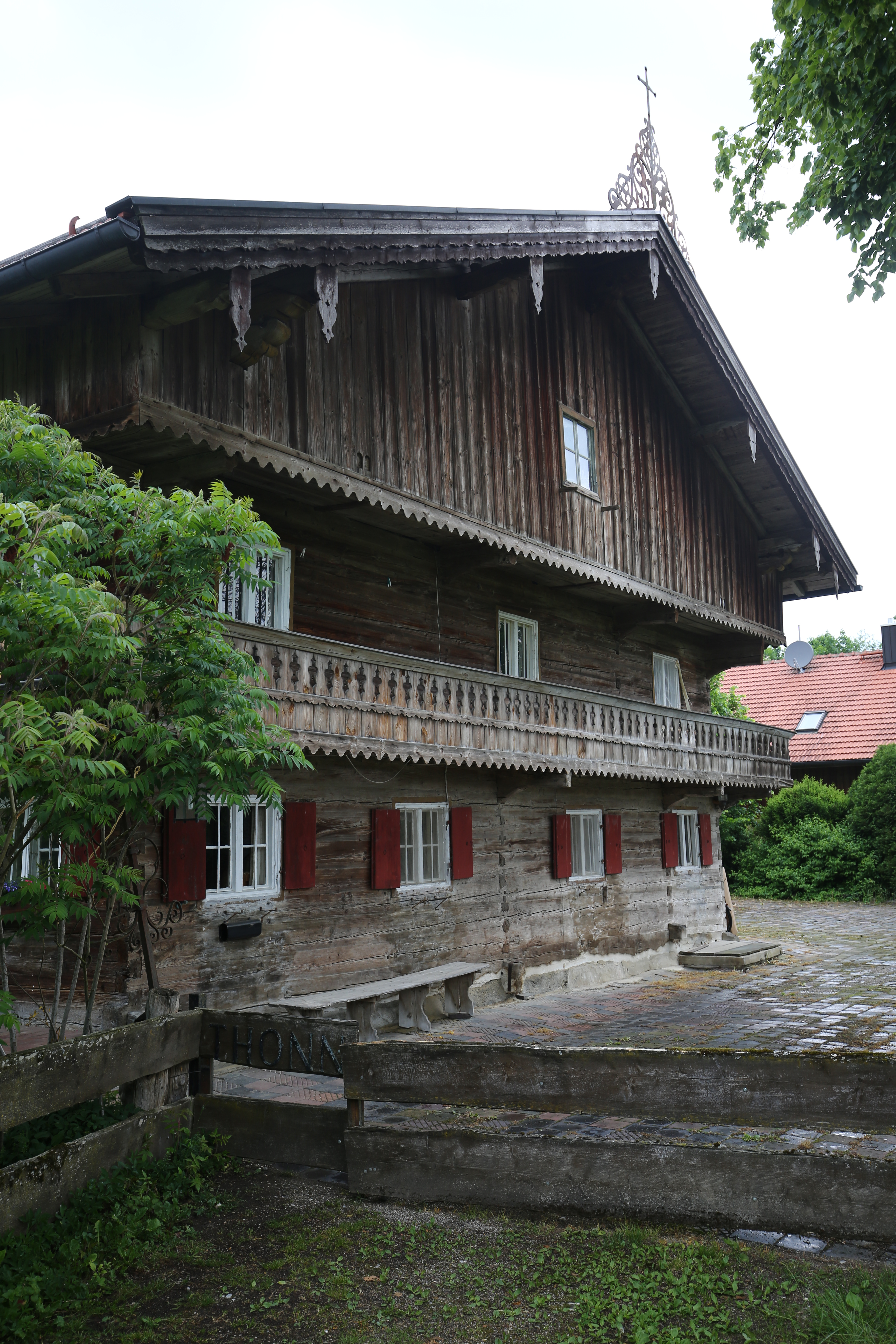 Jettenhausen ist ein Ortsteil von Oberhaching im südlichen Landkreis München